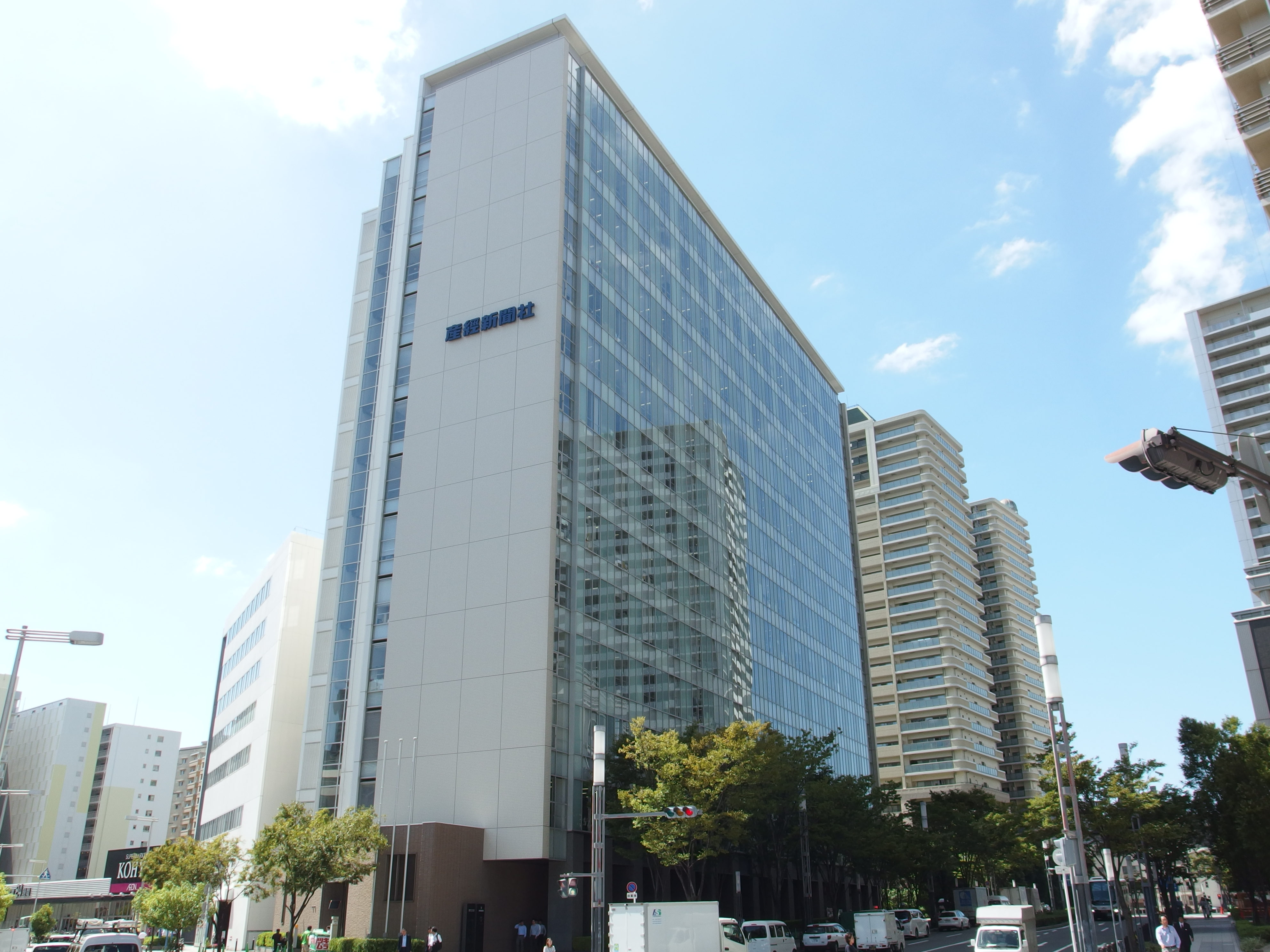 大阪市にある産経新聞大阪本社が入居する難波サンケイビル。